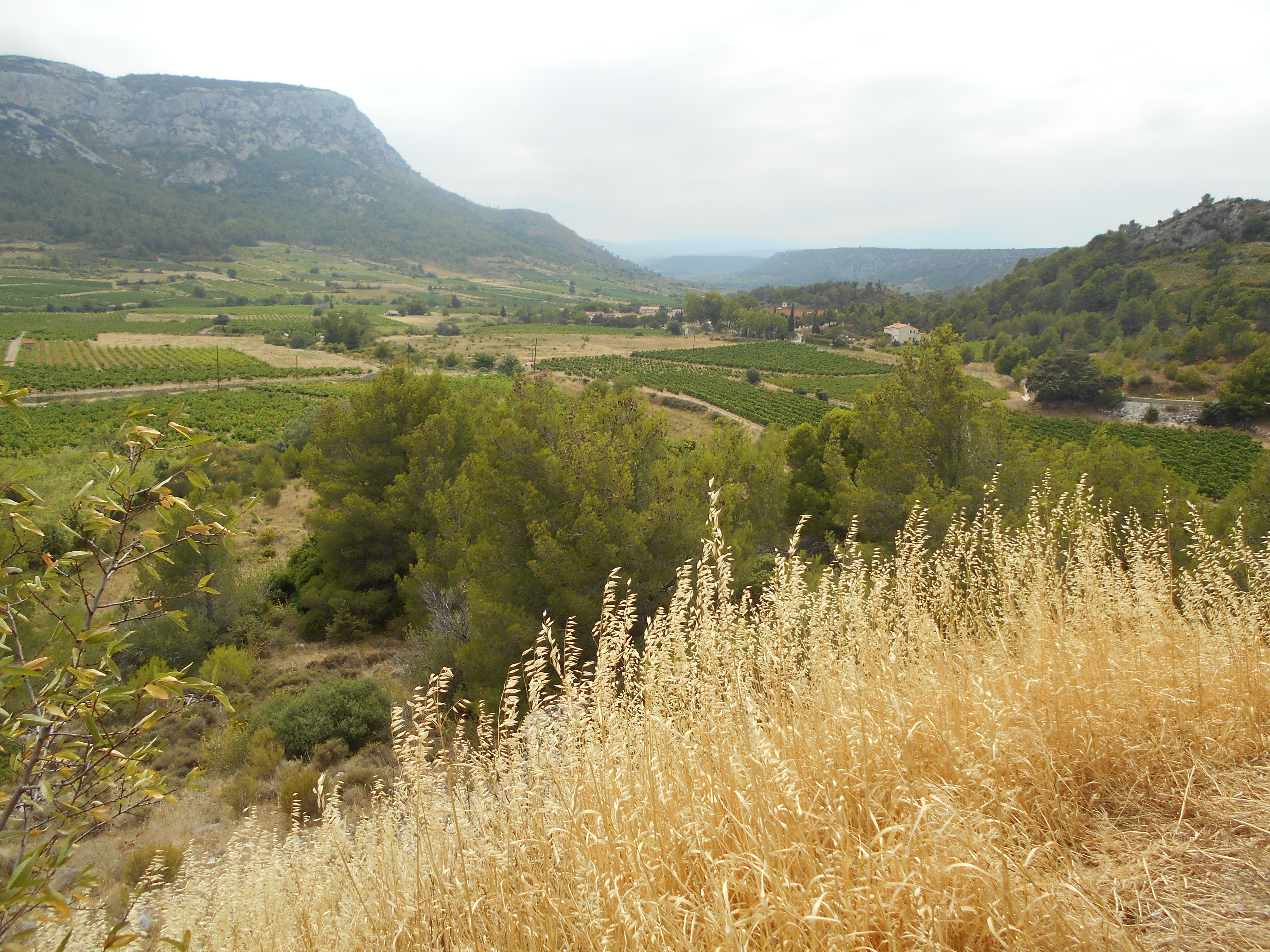 Vingrau i la seva vall des de llevant